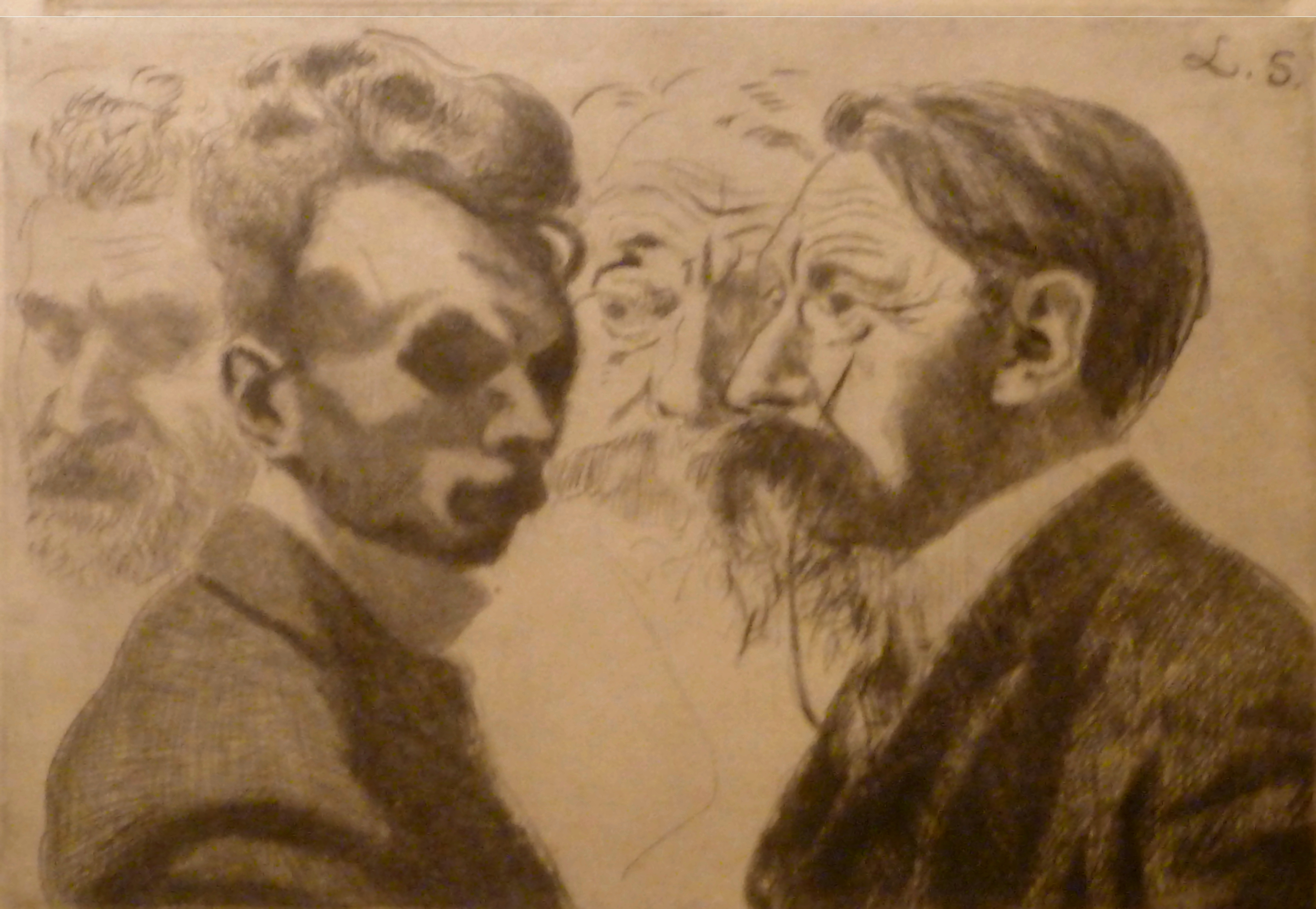 "Zelfportret met Emile Verhaeren en portret van Edmond Deman" (1908); drogenaald op papier door de Belgische kunstenaar Léon Spilliaert